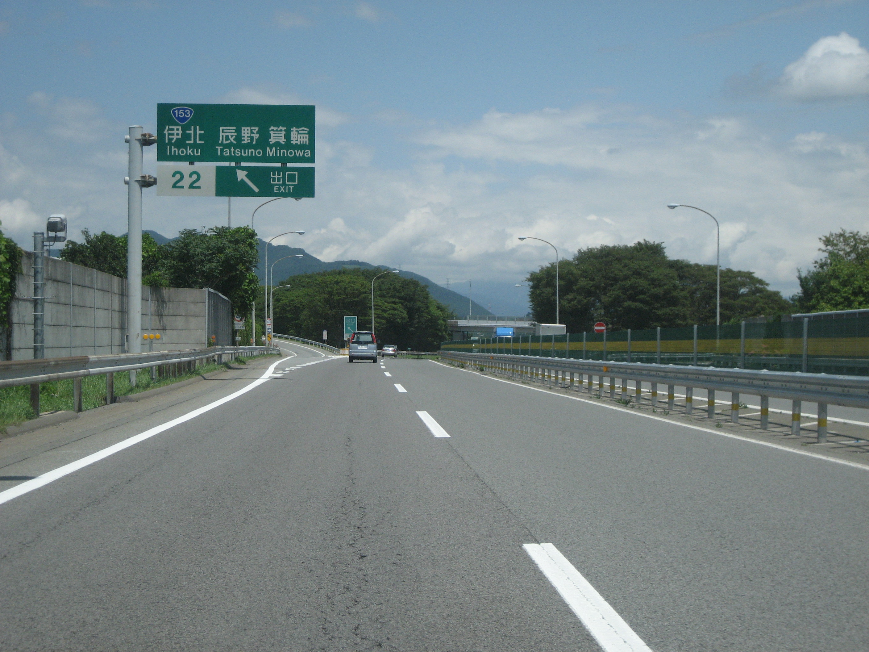 中央自動車道伊北インターチェンジ